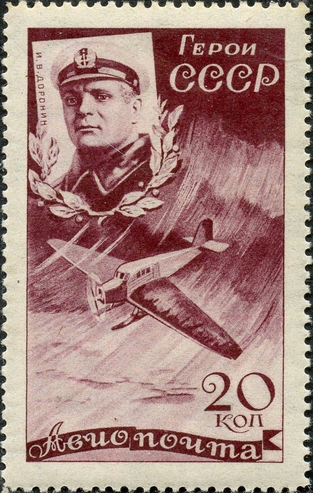 Почтовая марка СССР - Доронин Иван Васильевич, Герой Советского Союза